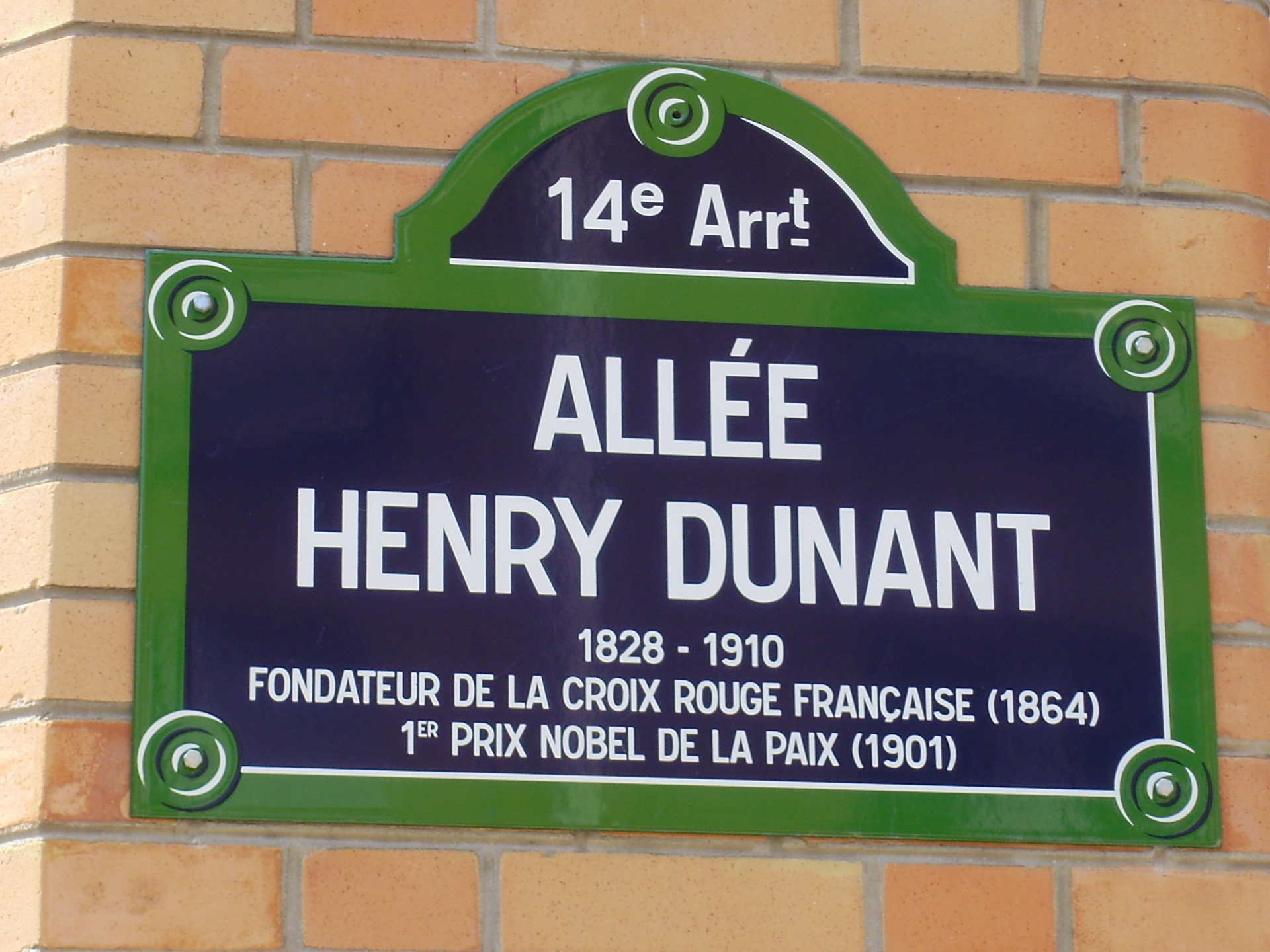 Plaque indicatrice de l'allée Henry-Dunant, à Paris 14e, France, à l'intérieur de l'ancien hôpital Broussais.